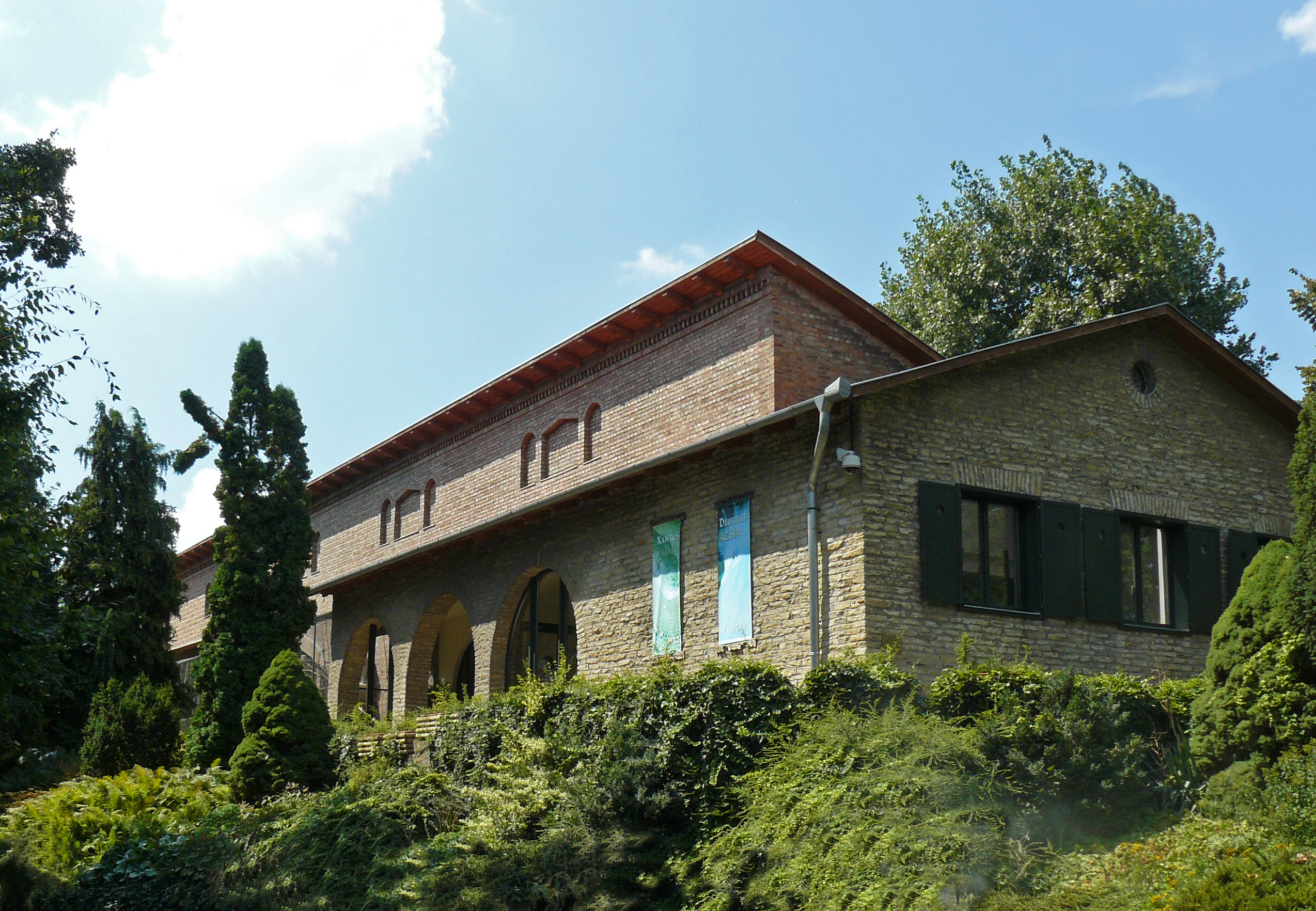 A budapesti Fővárosi Állatkertben található Xántus-ház